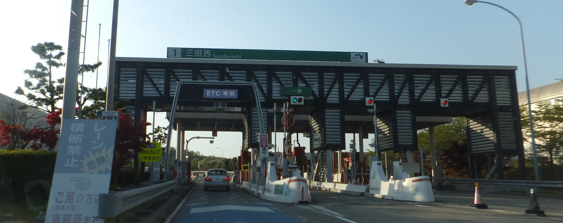 三田西インターチェンジ